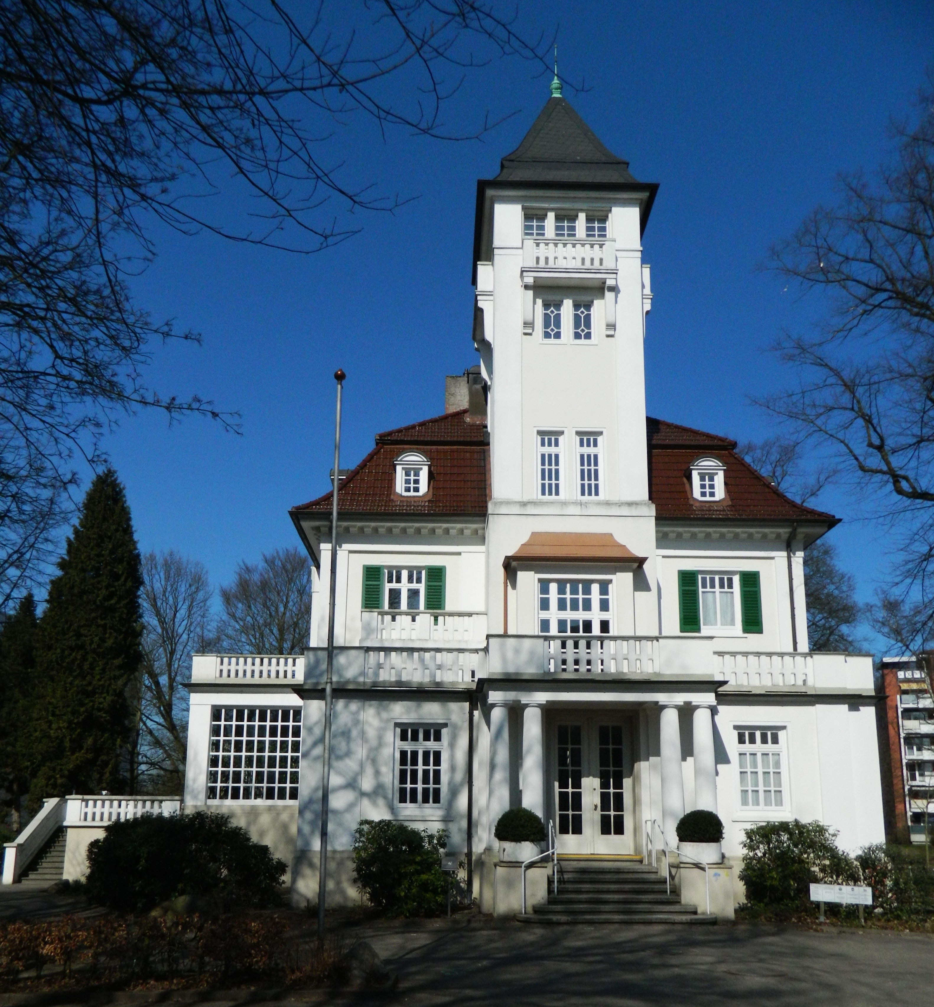 Glinde, Germany